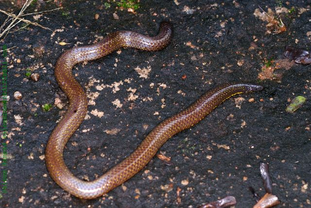 Elliots Shieldtail snake, Bannerghatta, India